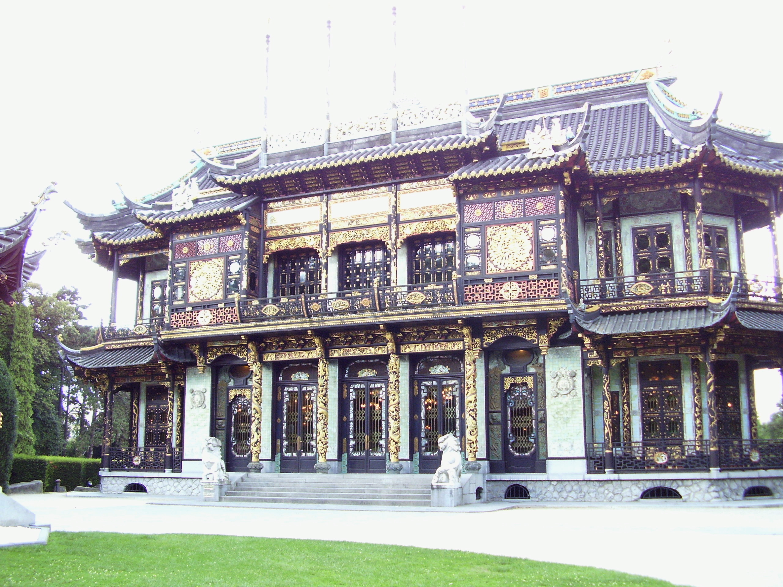 Description: Le Pavillon chinois, musées d'Extrème-orient, Laeken (Bruxelles) Author: User:Ben2 Date of creation: 10 août 2006 Source: Photo personnelle